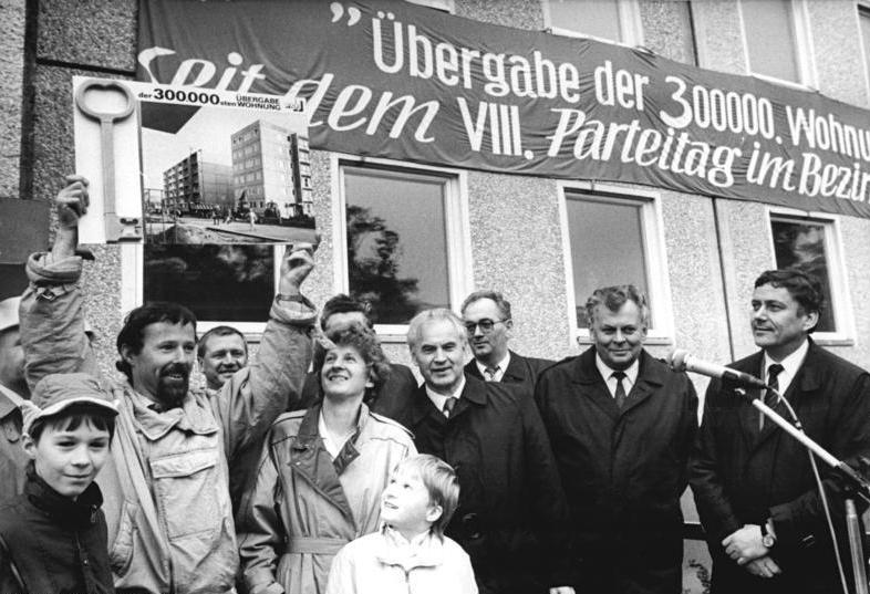 ADN-ZB-Hiekel-28.4.89-Dresden: Jubiläumswohnung- Im Innerstädtischen Neubaubebiet Königsheimplatz wurde die 300.000 seit dem VIII. Parteitag der SED im Elbebezirk neugebaute beziehungsweise modernisierte Wohnung an die Familie des Baufacharbeiters Bernd Fiedler übergeben. Anwesend waren Hans Modrow (4.vr.), 1. Sekretär der SED-Bezirksleitung Dresden, und der Oberbürgermeister der Stadt, Wolfgang Berghofer (r.).